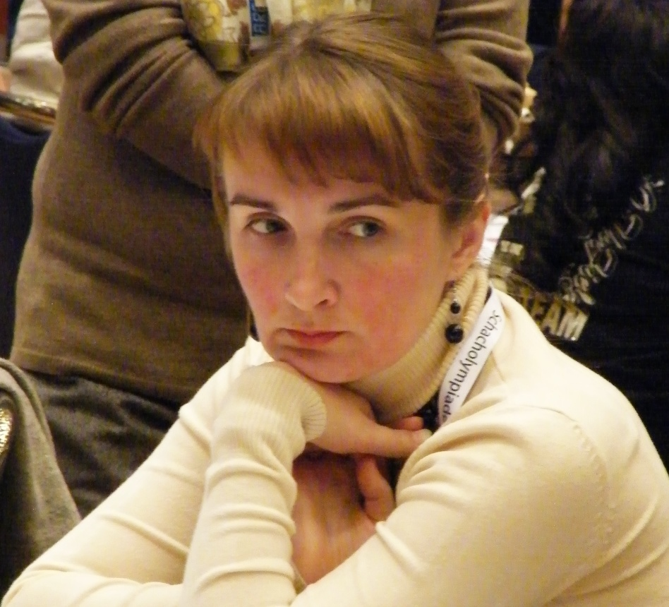 Tatjana Berlin bei der 38. Schacholympiade in Dresden 2008